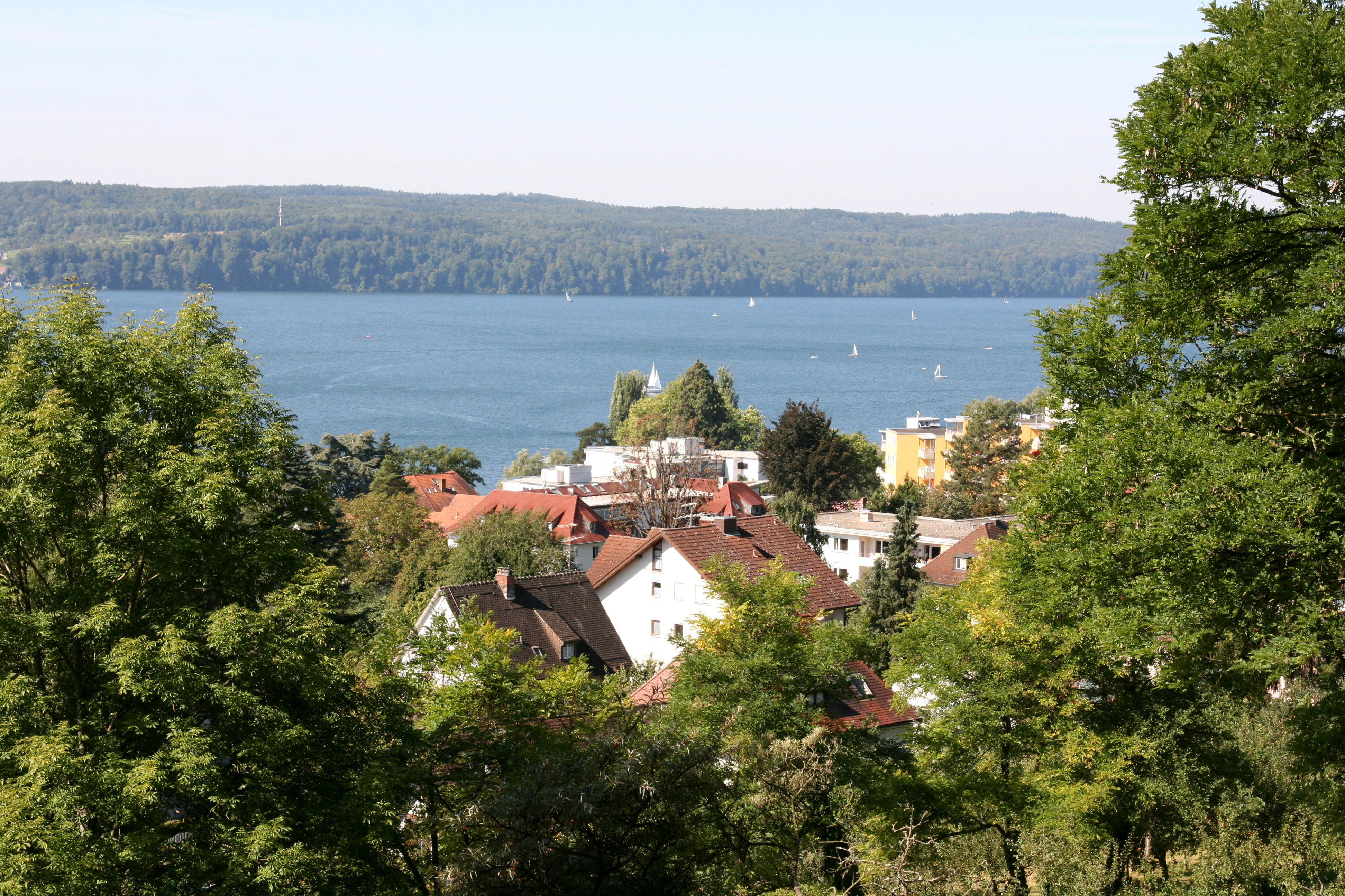 Blick von Schloss Rauenstein auf Überlingen